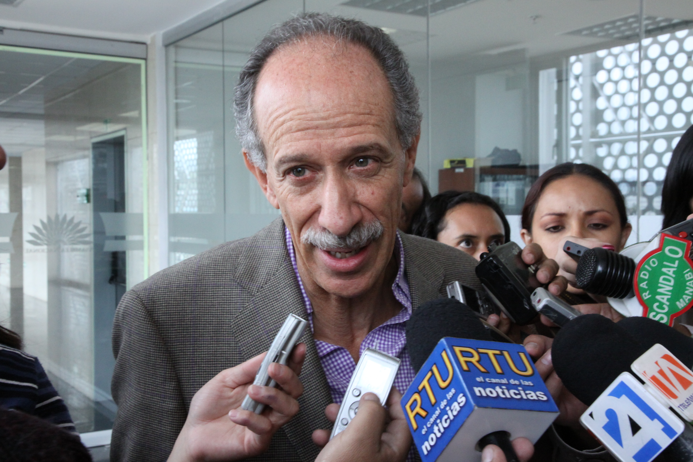 31 de Marzo de 2010